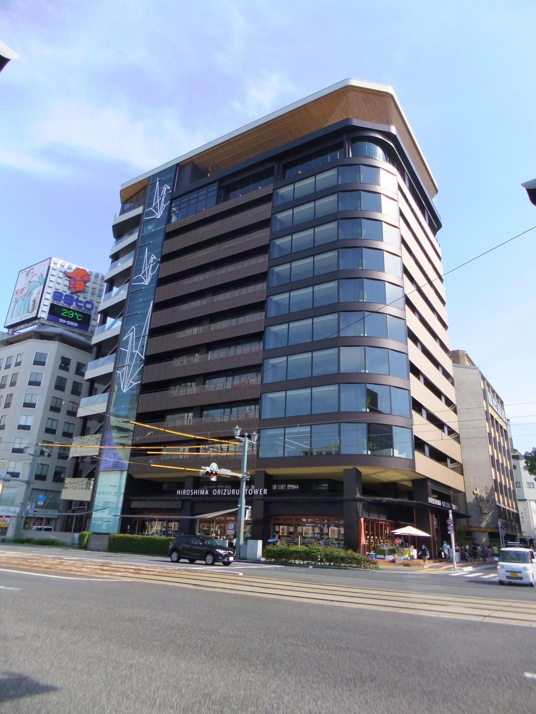 広島マツダ大手町ビル